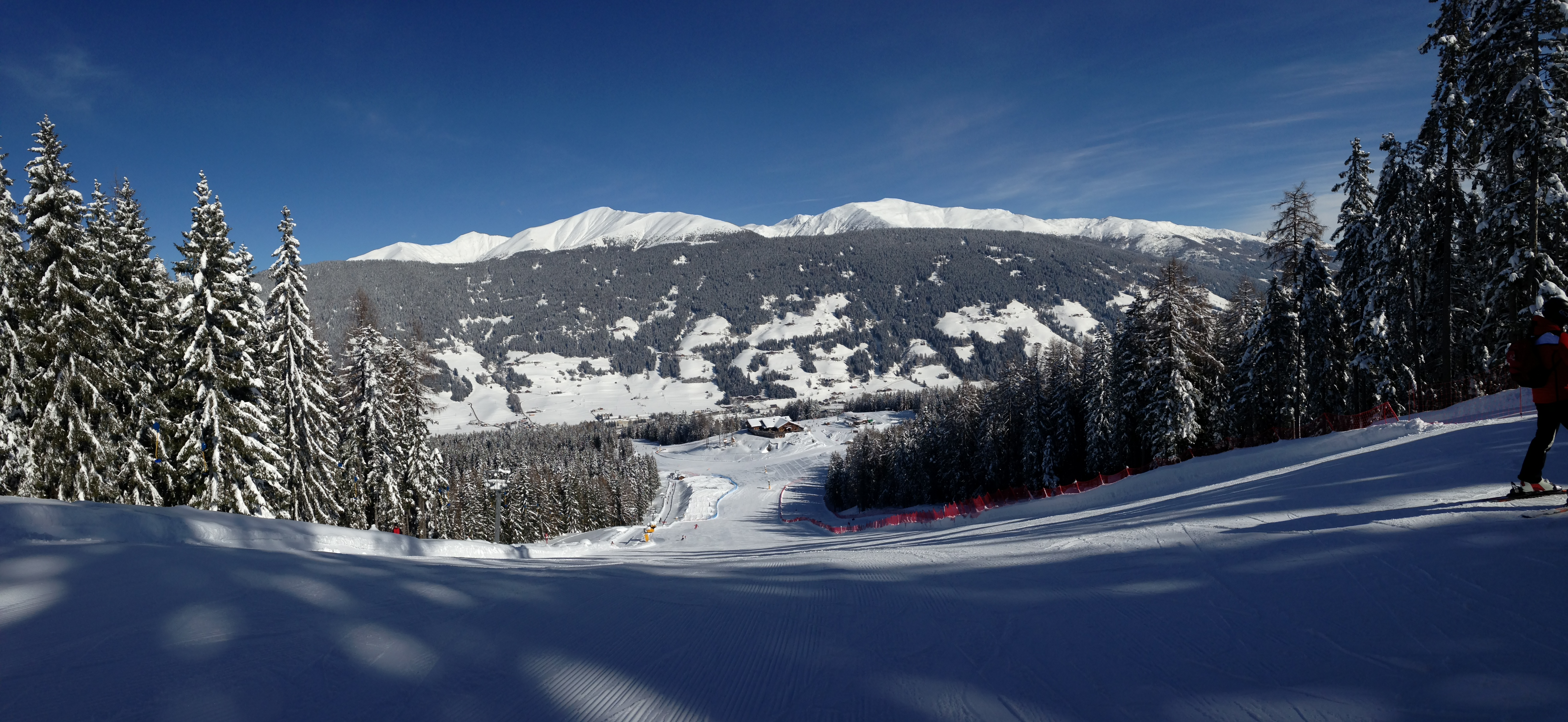 Impianti sciistici Baranci